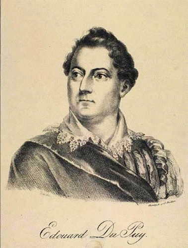 Komponisten Jean Baptiste Édouard Du Puy Kilde: Det Kongelige Bibliotek Rettighedshaver: Alle rettigheder udløbet